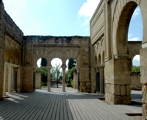 Edificio Basilical Superior de Medina Azahara, Córdoba (España).